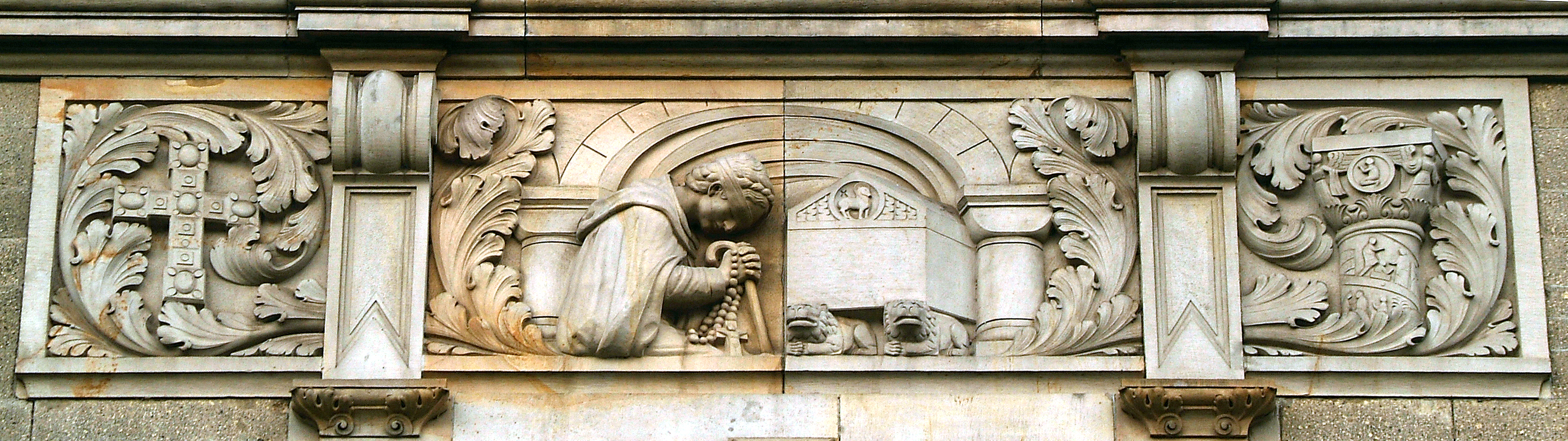 Der Ortsname Hannover ist erstmals erwähnt in den "Miracula Sancti Bernwardi", wonach ein Mädchen aus dem "vicus honovere", das um 1150 am Grab des Bischofs Bernward von Hildesheim betete, von einem Augenleiden geheilt wurde. Der Bildhauer Peter Schumacher schuf das Relief als Teil des halbplastischen Geschichtsfrieses am Neuen Rathaus in Hannover. Links das Bernwardskreuz, rechts die Bernwardssäule.